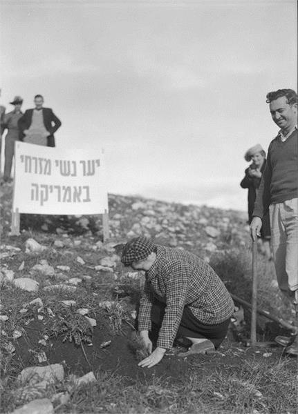 ביריה - גב' גטספלד, נוטעת עץ ראשון ביער "נשי מזרחי באמריקה".